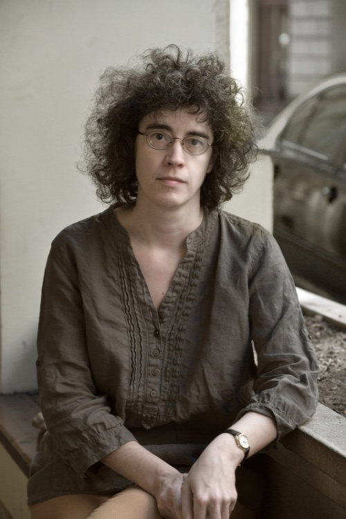 Szvoren Edina József Attila-díjas író, zenetanár.